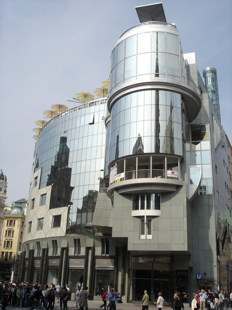 Haas Haus, Vienna